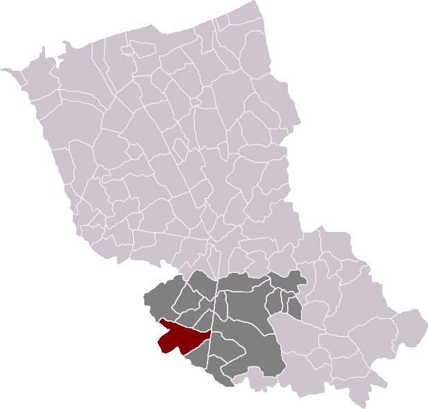 Locatie gemeente Blaringem in arrondissement Duinkerke. Zelfgemaakt. Location of Blaringhem municipality in the arrondissement of Dunkirk. Self made. Localisation de la commune de Blaringhem dans l'arrondissement de Dunkerque. Fait moi-même.